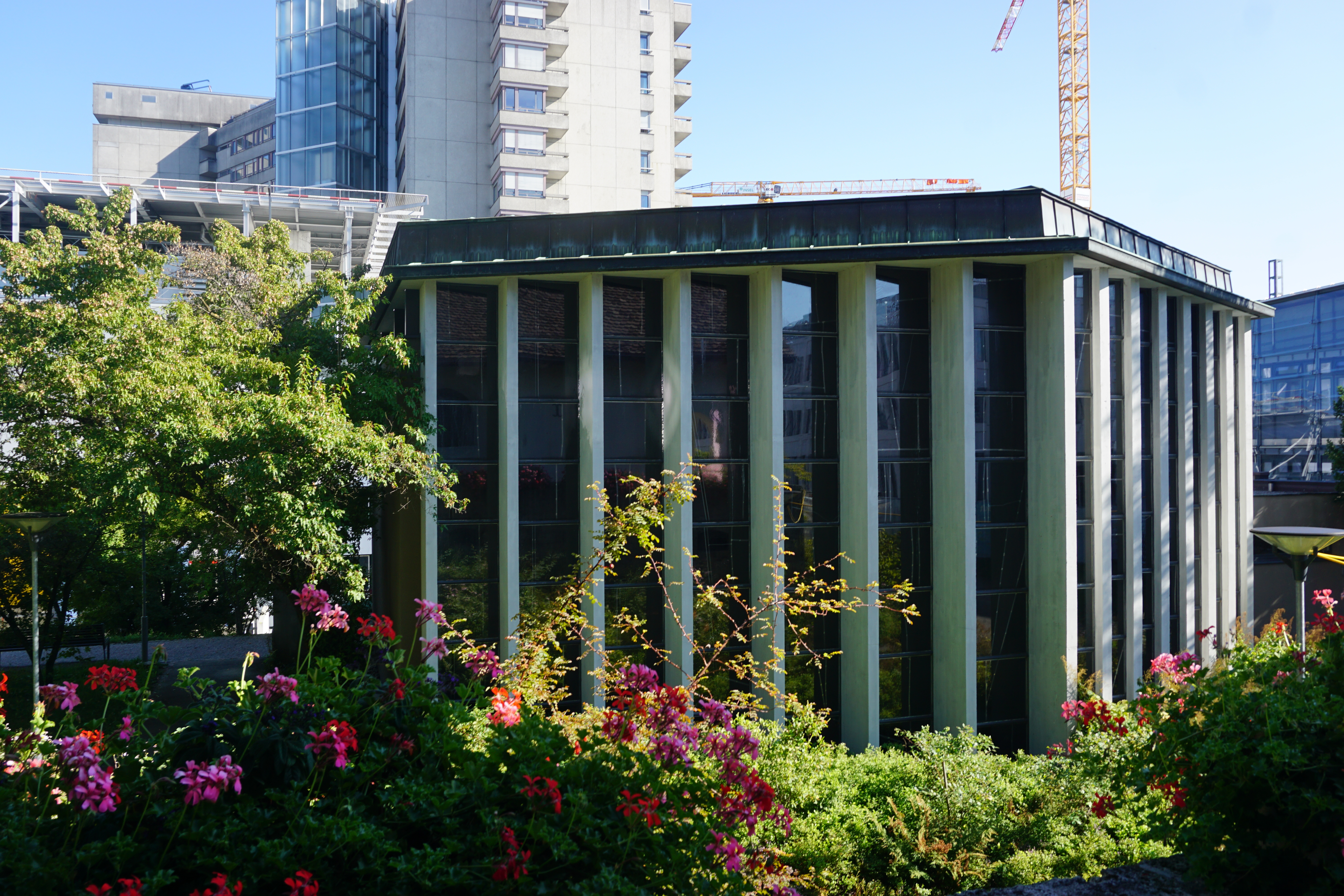 Elisabethenkapelle Chorseite mit Kunstverglasung zwischen Betonlamellen.